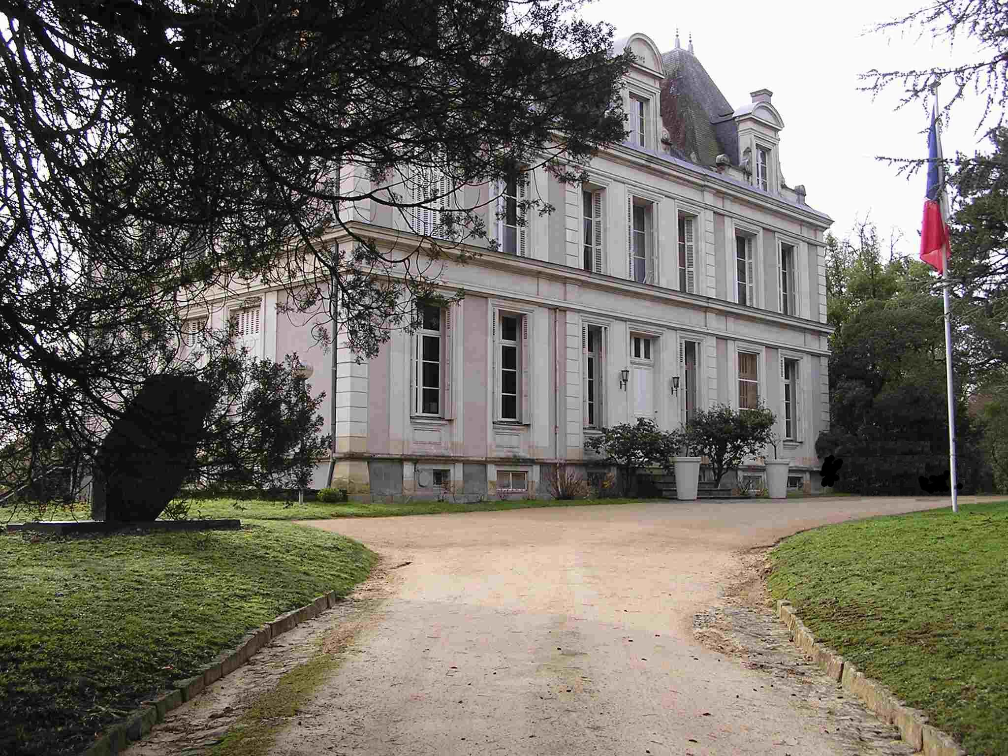 Photo de la sous-préfecture de segré